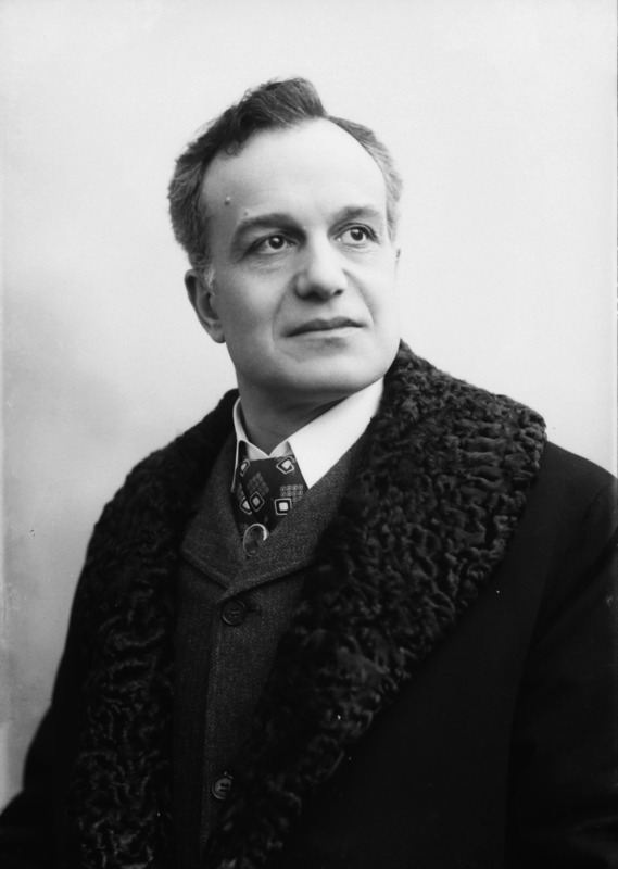 Gustavo Salvini fotografato da Mario Nunes Vais